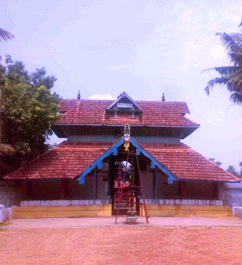 ഉദയമ്പേരൂർ പെരുംതൃക്കോവിൽക്ഷേത്രം-കിഴക്കേഗോപുരം